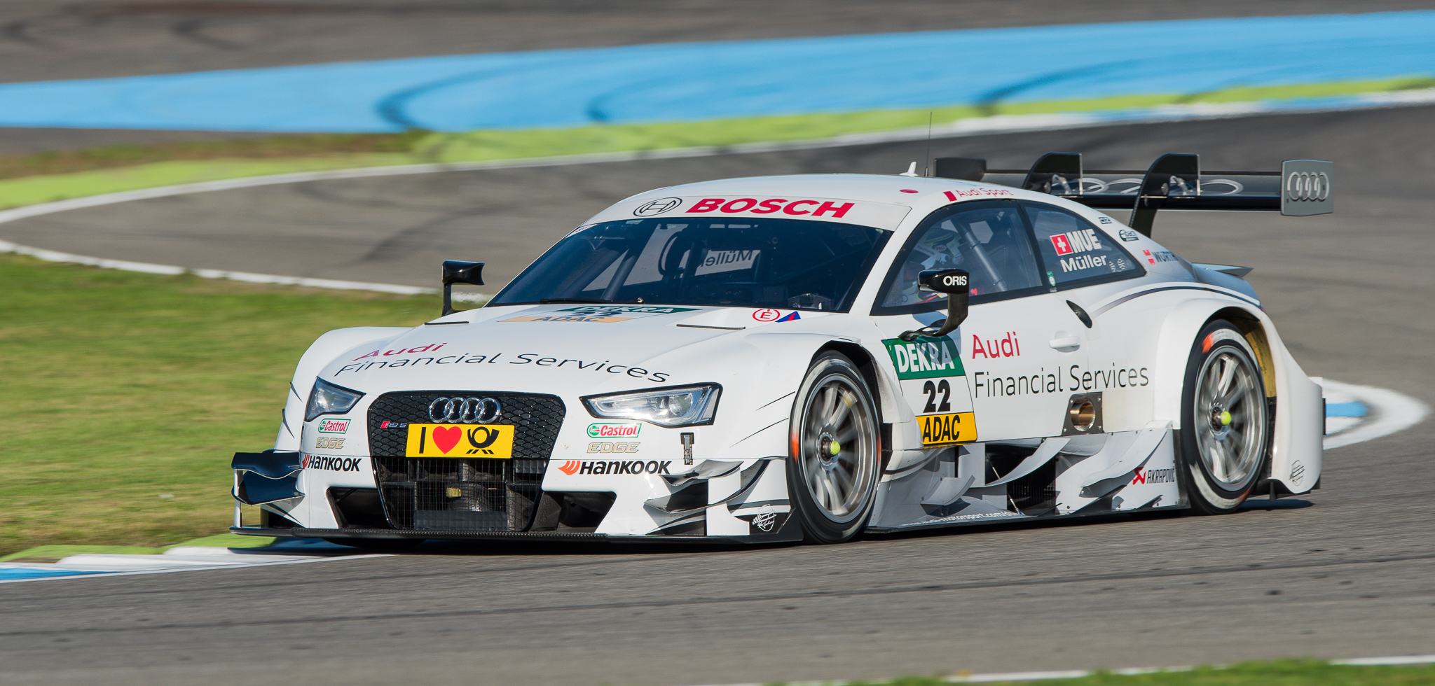 Audi Financial Services Audi RS 5 DTM,DTM,Deutsche Tourenwagen Masters,Hockenheimring,Motorsport,Nico Müller,Team Rosberg GmbH